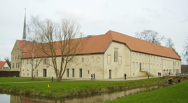 Kloster Gravenhorst Ansicht vom Garten